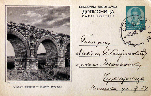 Разгледница од Скопскиот акведукт